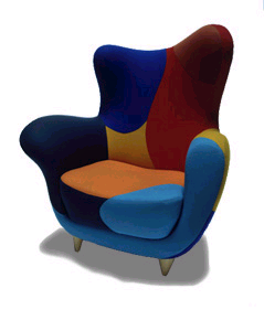 Sillón Alexandra